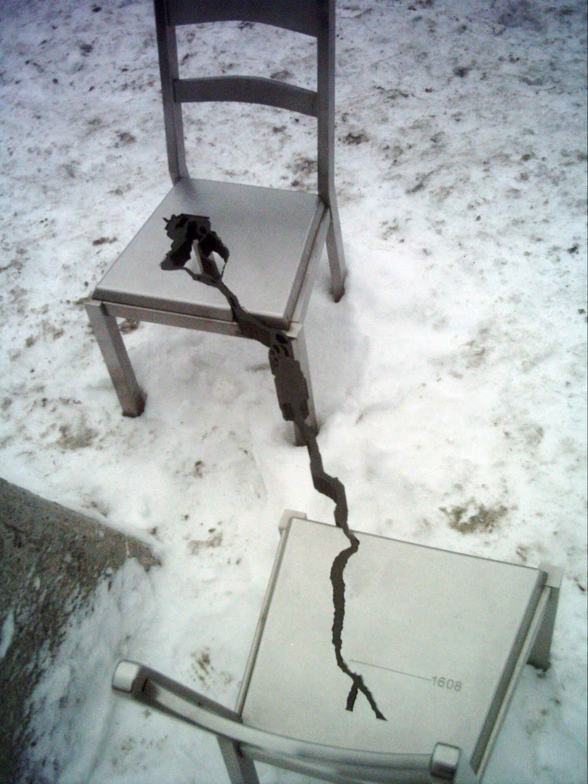 Rêver le Nouveau Monde, œuvre de Michel Goulet offerte par la Ville de Montréal aux citoyens de la Ville de Québec, à l'occasion du 400e anniversaire de sa fondation